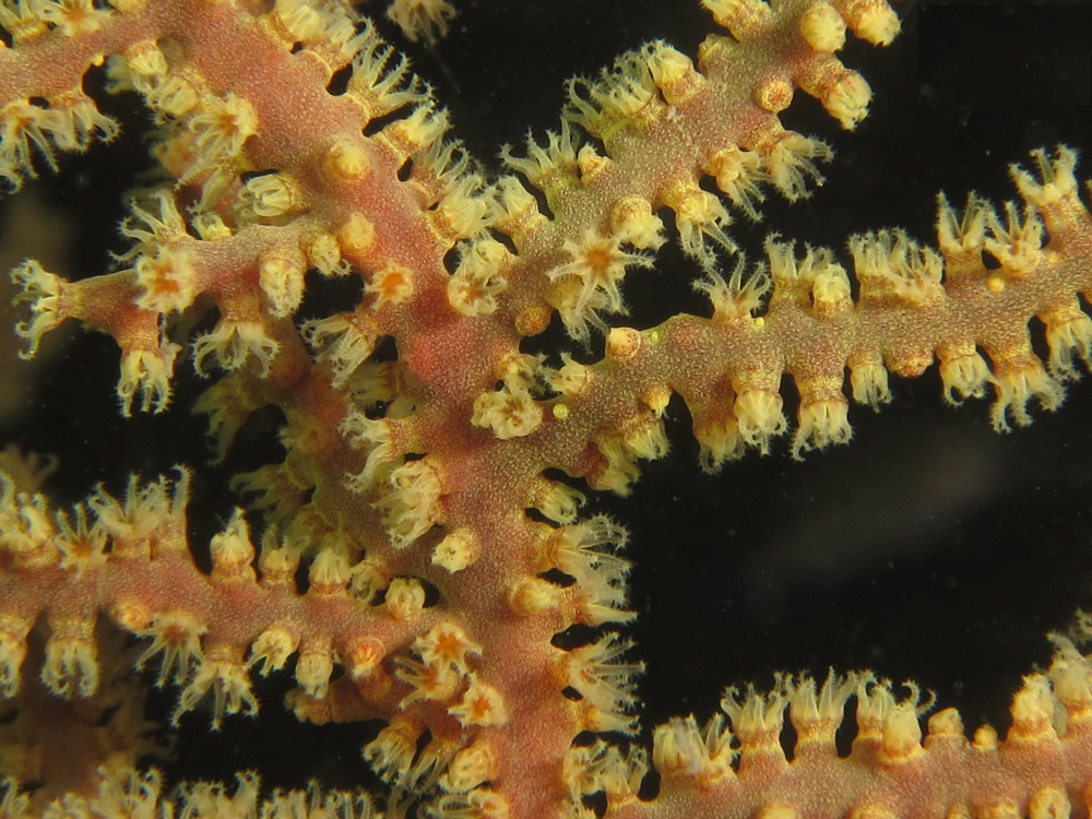 Vista de pólipos de Echinogorgia sp, en Koh PHangan, Tailandia